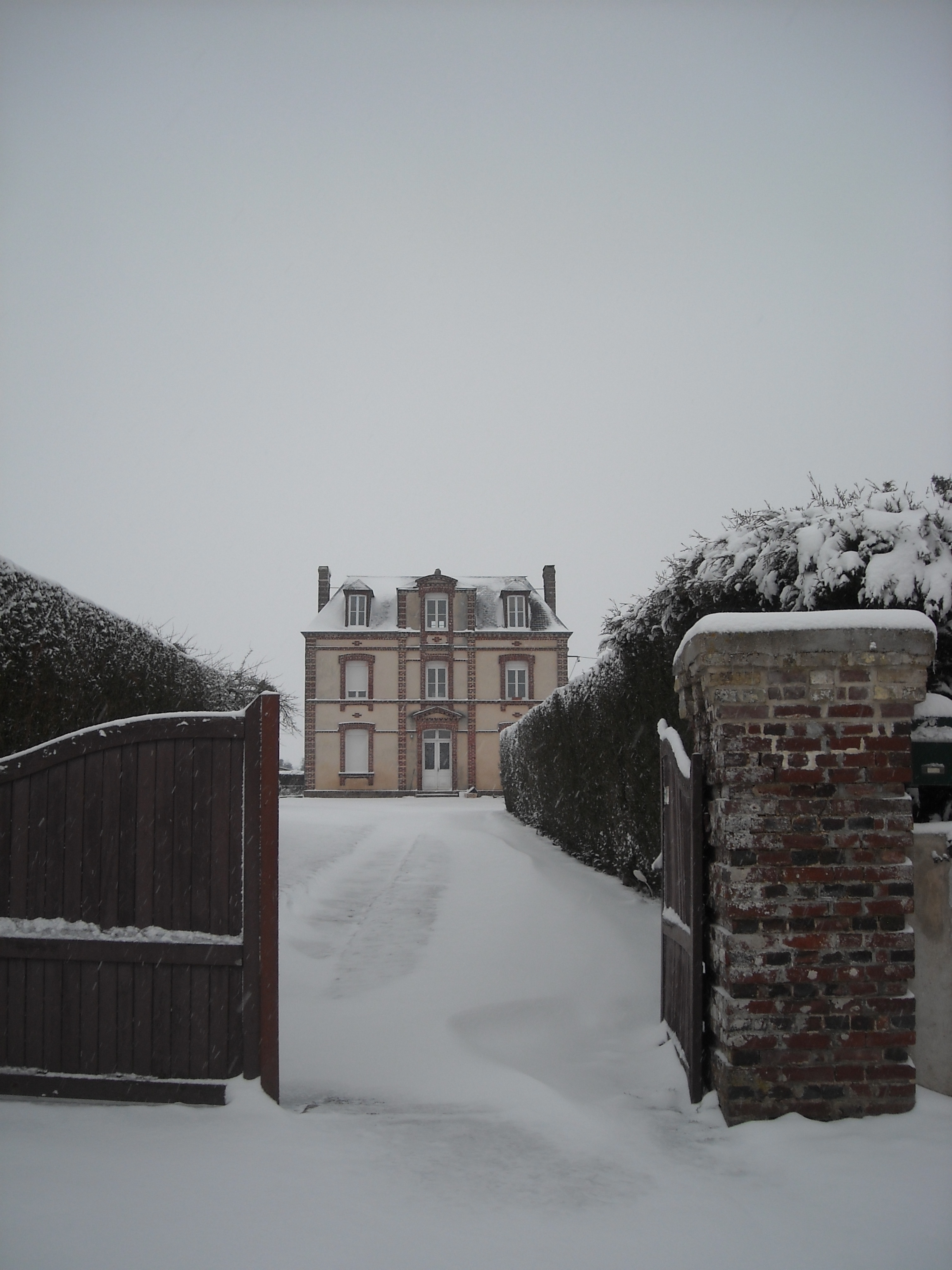 Ancien Presbytère, le 12 mars 2013